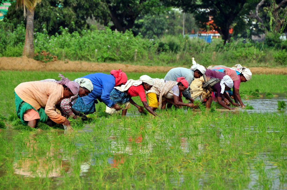 ഞാറു നടുന്നു